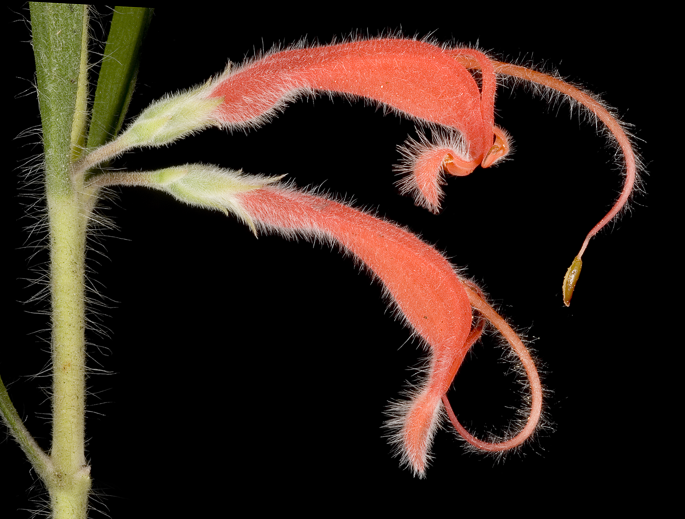 KRT3753